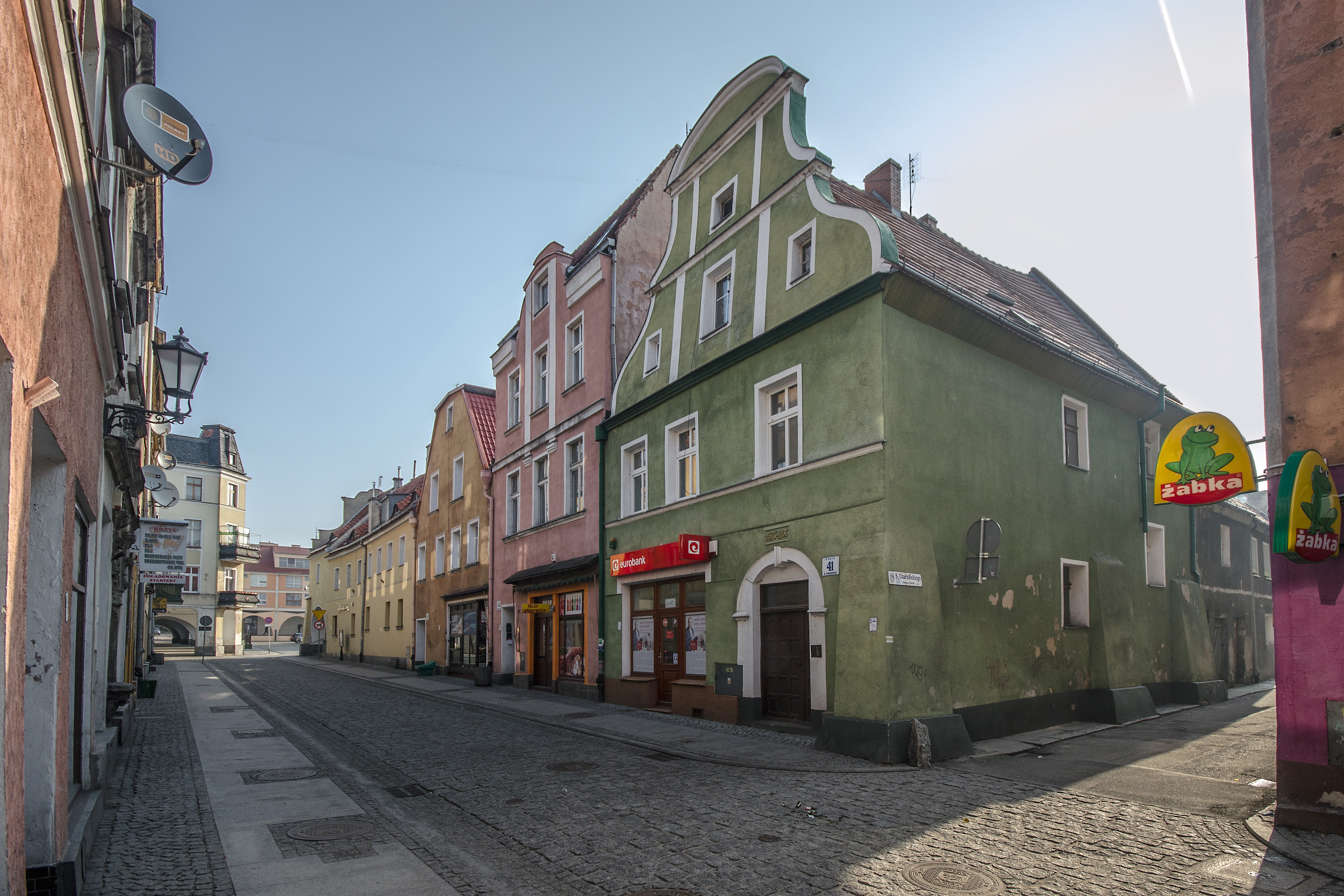 Jawor, dom, XVIII, 1936